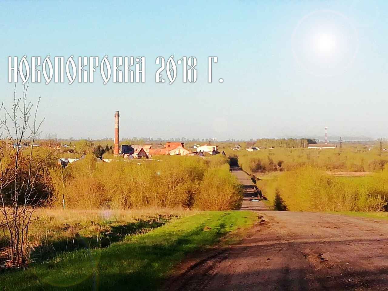 Рабочий поселок Новопокровка - 2018 г.